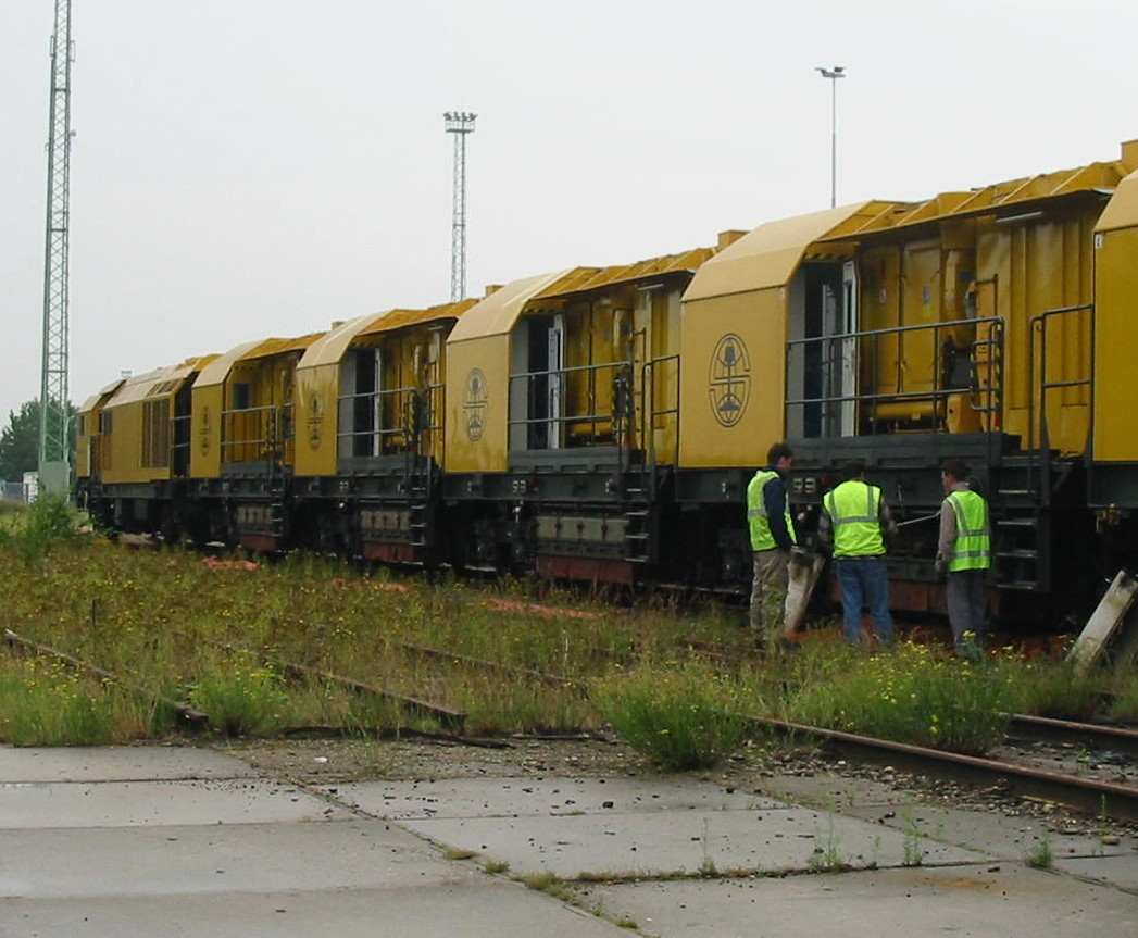 Slijptrein SPENO RR48, juli 2004, eigen foto ter beschikking gesteld onder GFDL